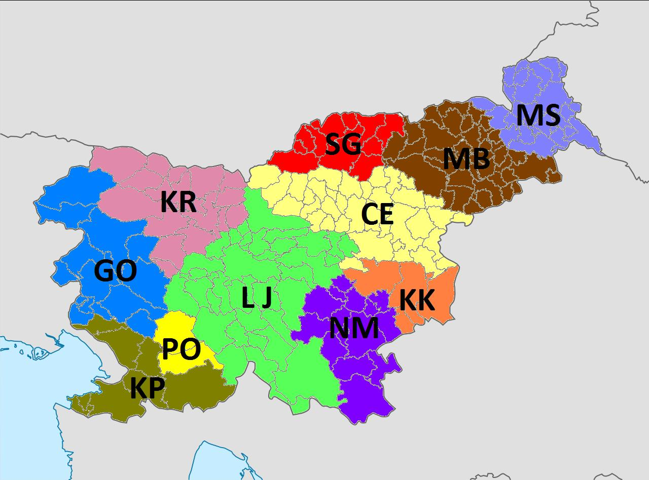 Státní poznávací značky ve Slovinsku